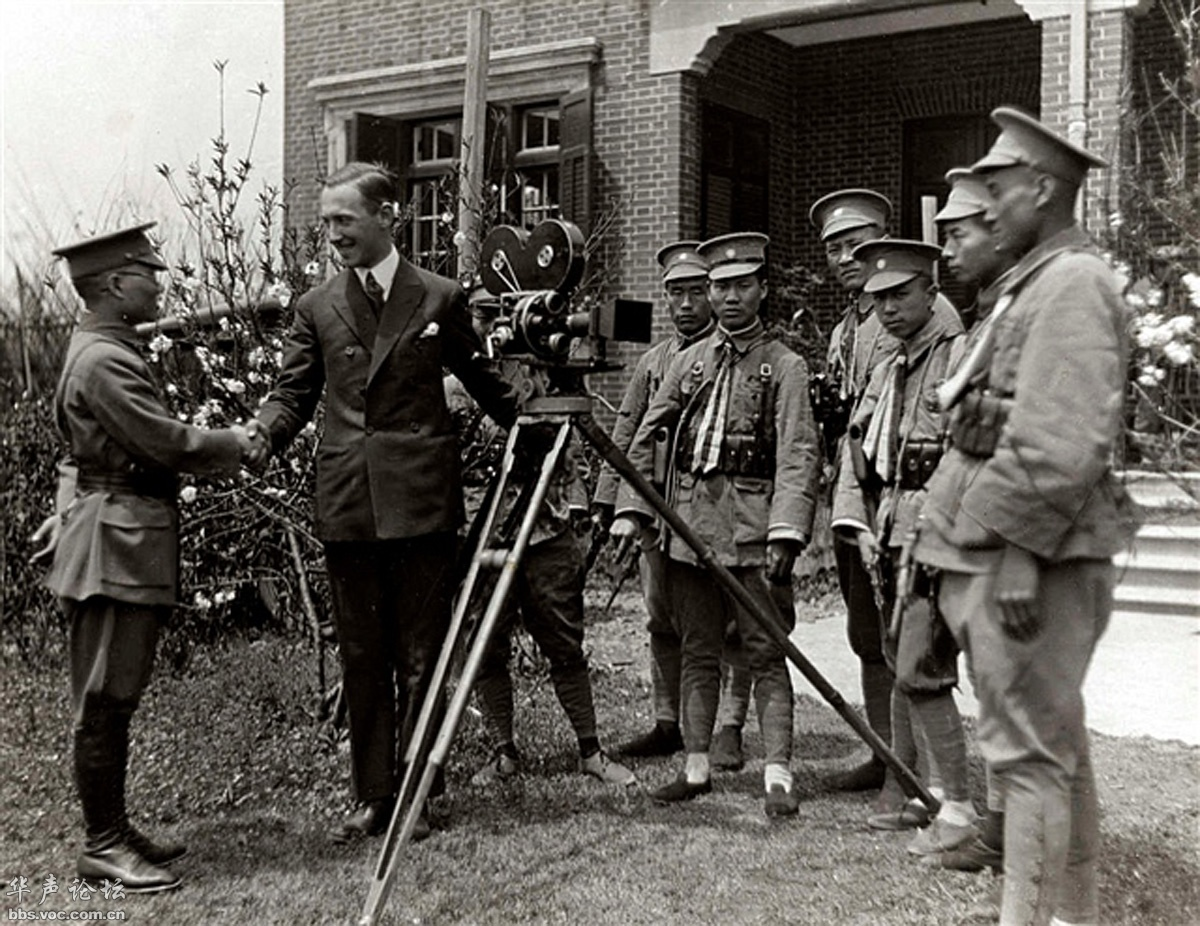 北伐軍のドキュメンタリーを撮影した撮影者に感謝を示す何応欽。